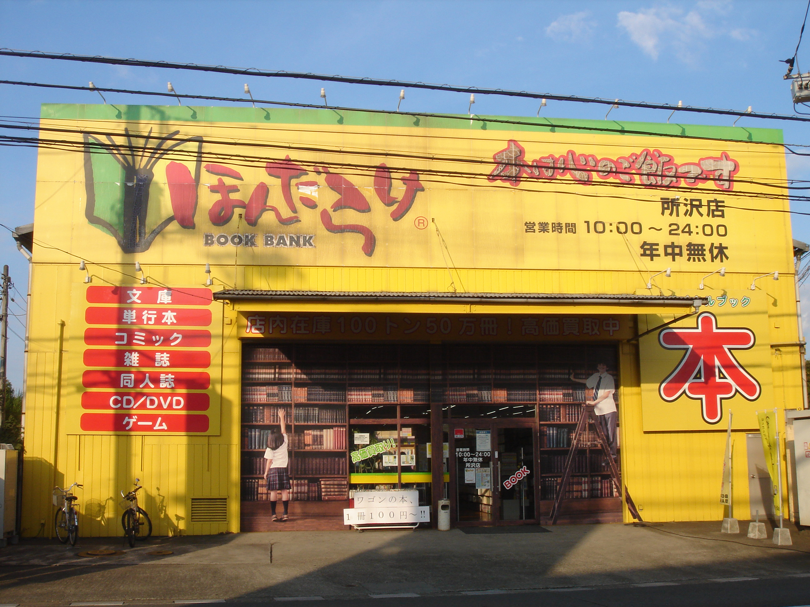 ほんだらけ所沢店。埼玉県所沢市に所在する古本屋。